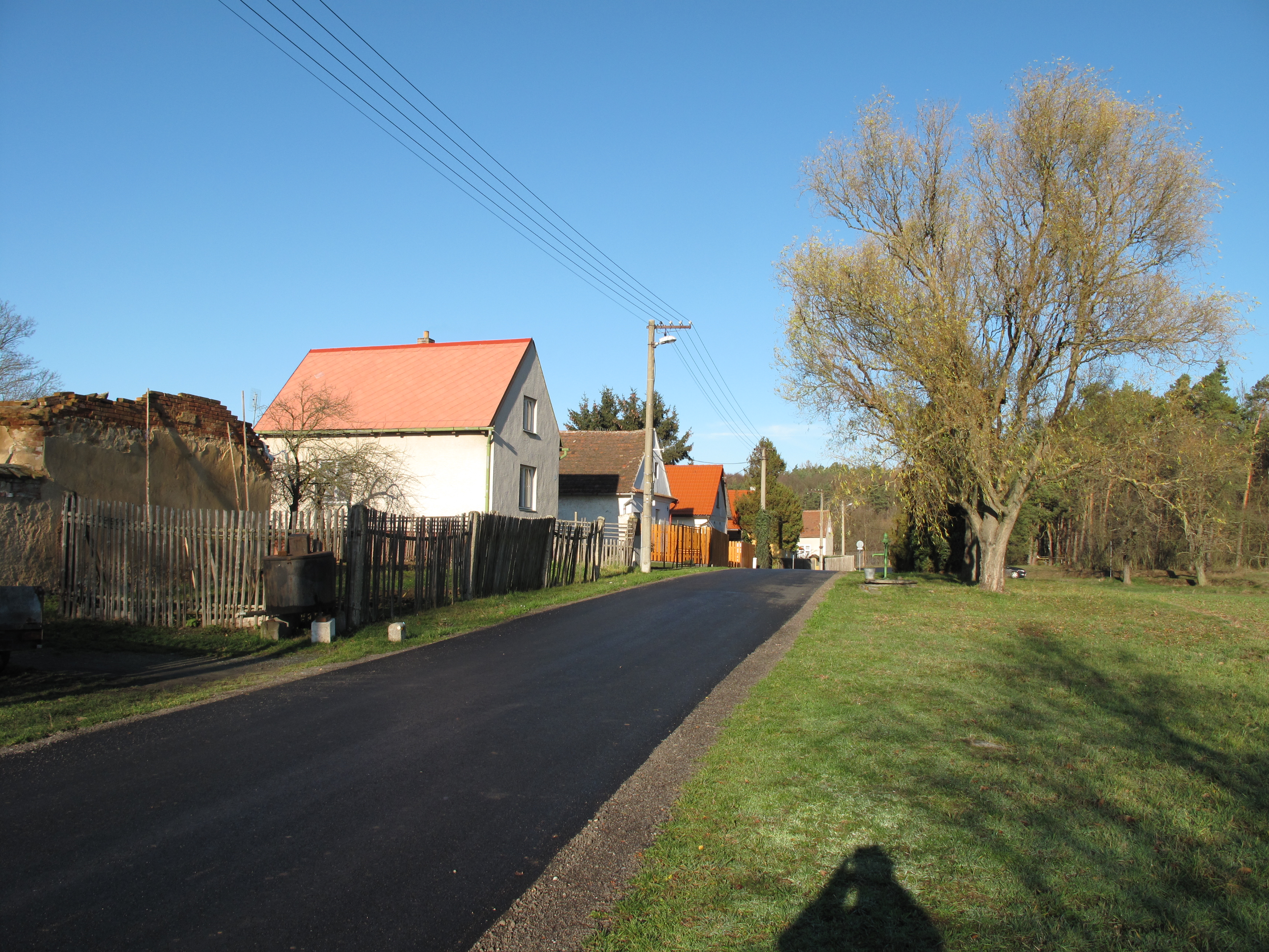 Domy v Horních Lažanech. Okres Plzeň-jih, Česká republika.